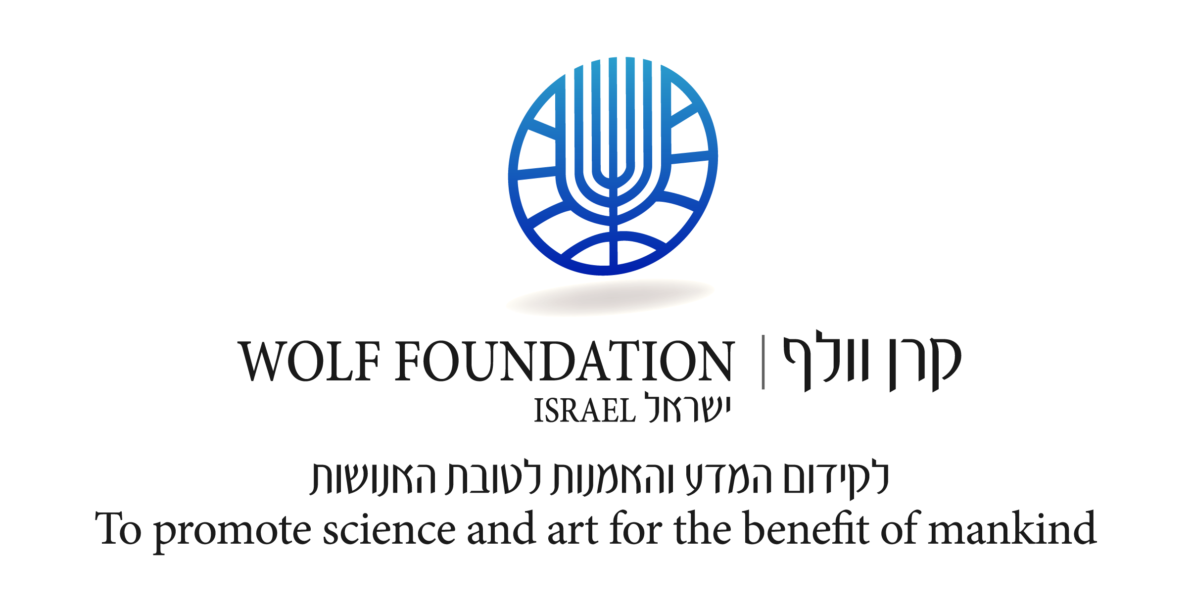 לוגו קרן וולף